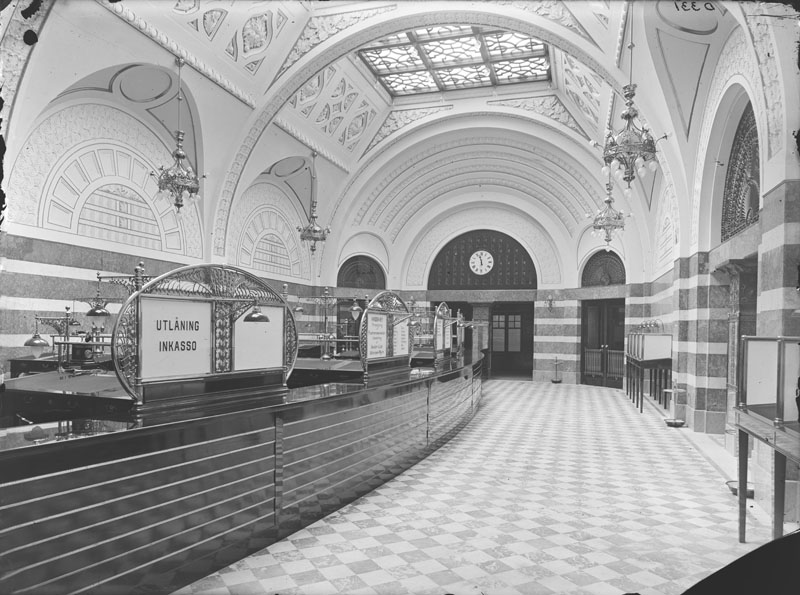 Bankhallen Drottninggatan 5, Skånes enskilda bank, Tid: 1900 - 1910